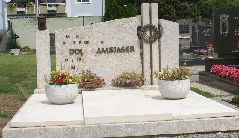 Rudolf Gamsjäger-Friedhof Oslip